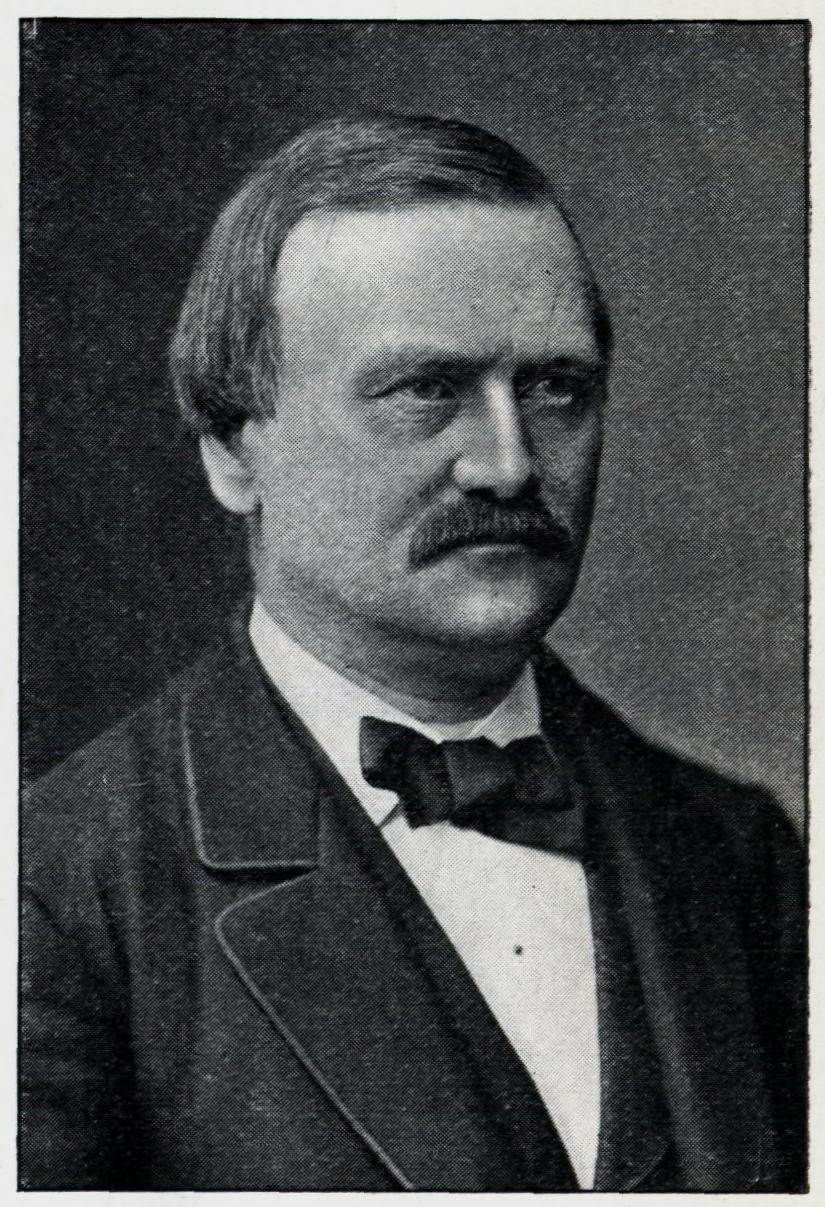 Illustrasjon hentet fra boken "En Christianiensers Erindringer fra 1850- og 60-Aarene" av Nielsen, Yngvar og utgitt av Gyldendal (Kristiania, 1910) Depicted person: Michael Birkeland